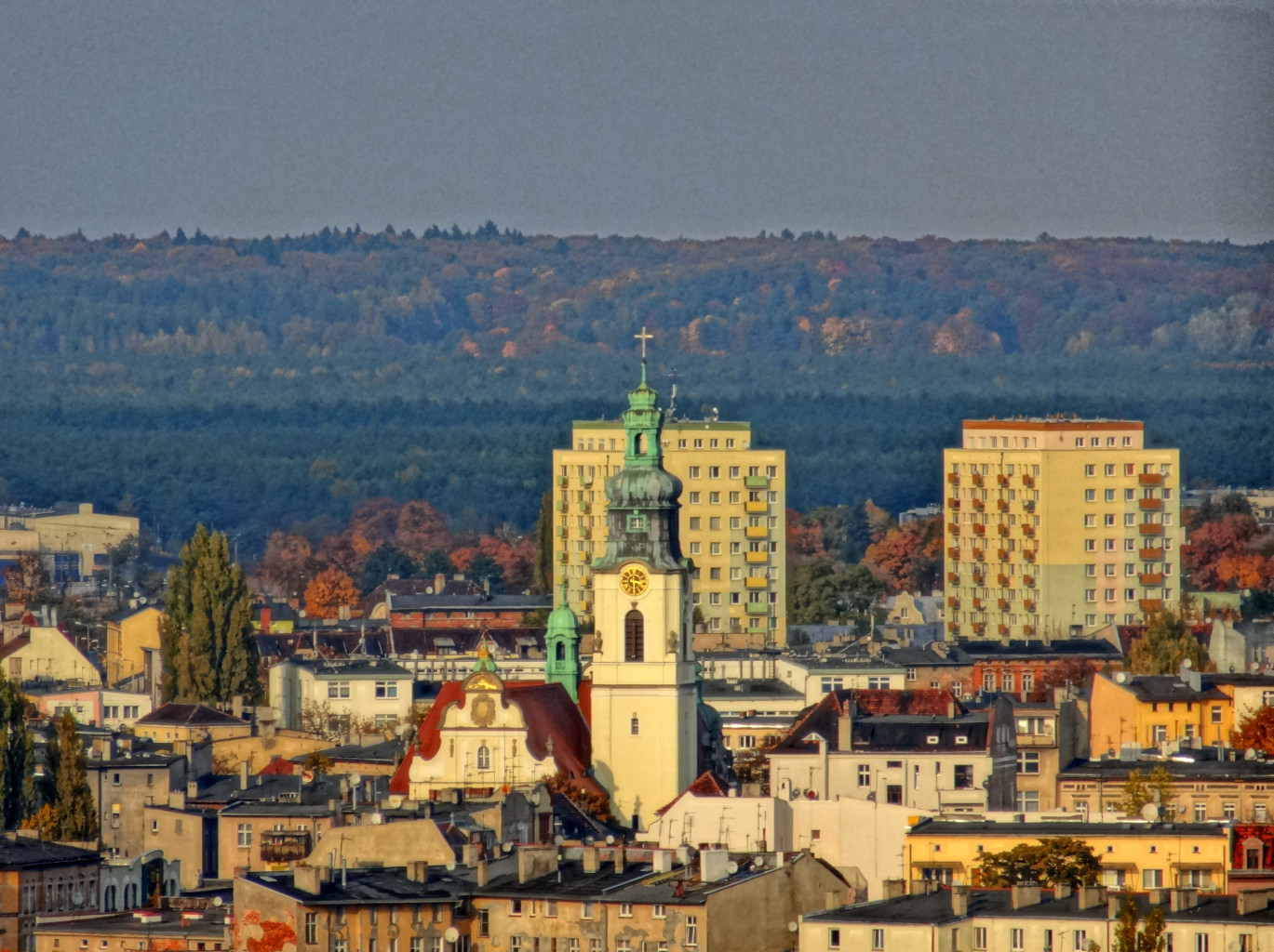 Kościół p.w. Najświętszego Serca Pana Jezusa w Śródmieściu Bydgoszczy - widok z wieży ciśnień